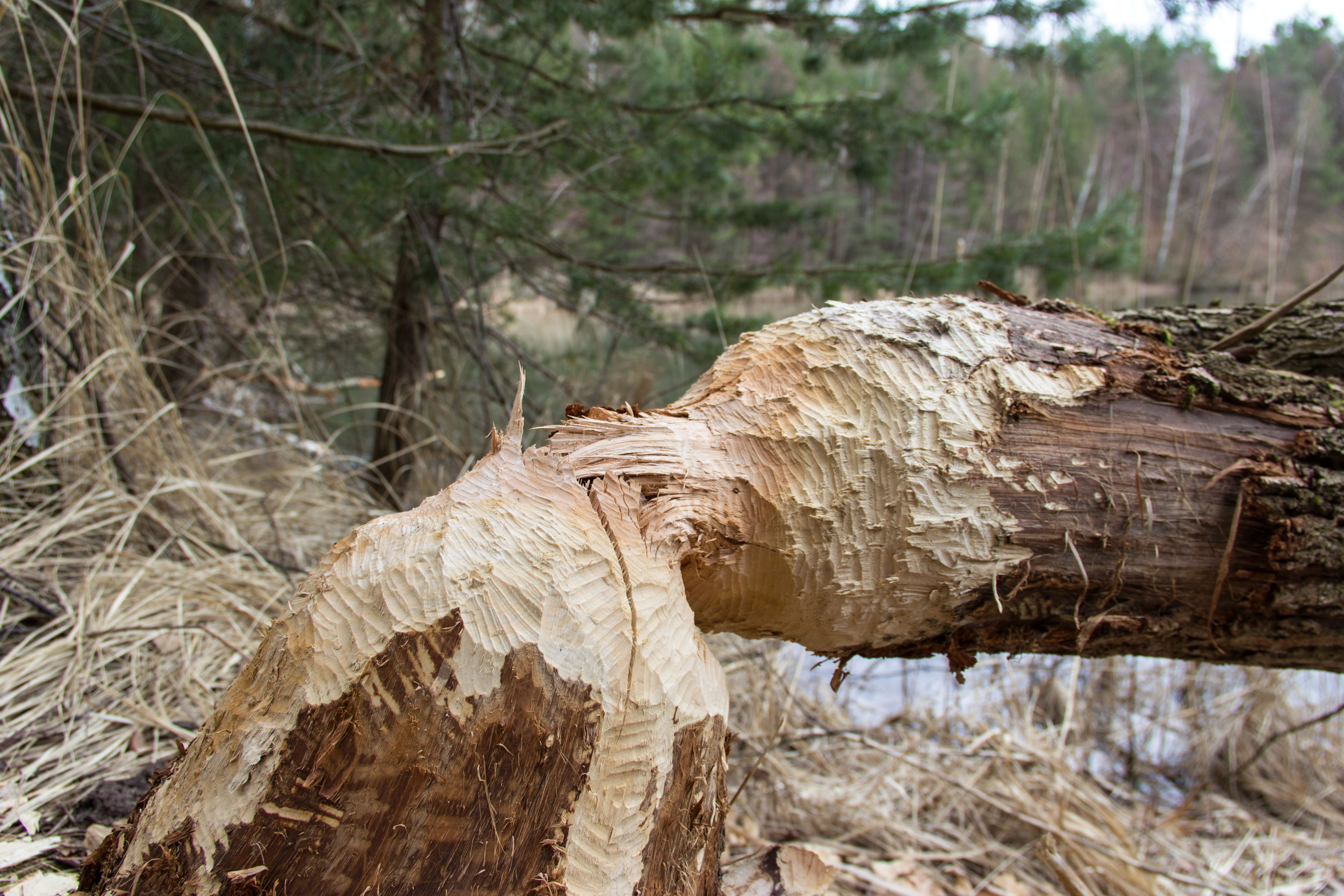 Kleiner Birkensee, Biberschaden